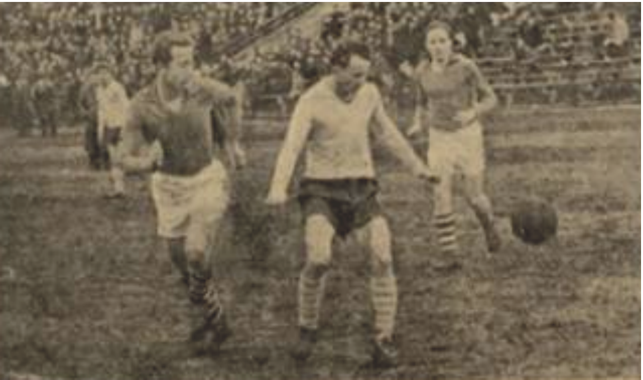 Derby Lublina, marzec 1960